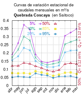 Curva de Variación Estacional Río Coscaya en Saitoco # Dirección General de Aguas # Diagnóstico y clasificación de los cursos y cuerpos de agua según objetivos de calidad. Cuenca quebrada de Tarapaca. # Santiago de Chile # Ministerio de Obras Públicas (Chile) # 2004 # url: # urlarchivo: # Tabla 4.3: Río Coscaya en Saitoco (m3/s), pág. 27 mes 5% 10% 20% 50% 85% 95% abr 0.189 0.174 0.156 0.121 0.077 0.052 may 0.261 0.221 0.180 0.122 0.075 0.057 jun 0.375 0.302 0.233 0.141 0.077 0.053 jul 0.344 0.279 0.217 0.134 0.074 0.052 ago 0.191 0.172 0.152 0.119 0.089 0.075 sep 0.148 0.139 0.128 0.108 0.082 0.067 oct 0.140 0.128 0.115 0.094 0.073 0.063 nov 0.152 0.134 0.115 0.086 0.060 0.048 dic 0.159 0.142 0.123 0.095 0.069 0.057 ene 0.306 0.254 0.204 0.133 0.079 0.058 feb 0.327 0.270 0.215 0.138 0.081 0.059 mar 0.349 0.282 0.217 0.132 0.072 0.050 This plot was created with Gnuplot.